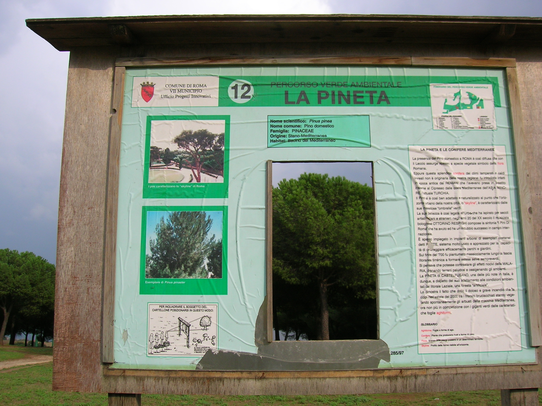 Parco Giovanni Palatucci, Tor Tre Teste, Municipio VII, Roma, Italia